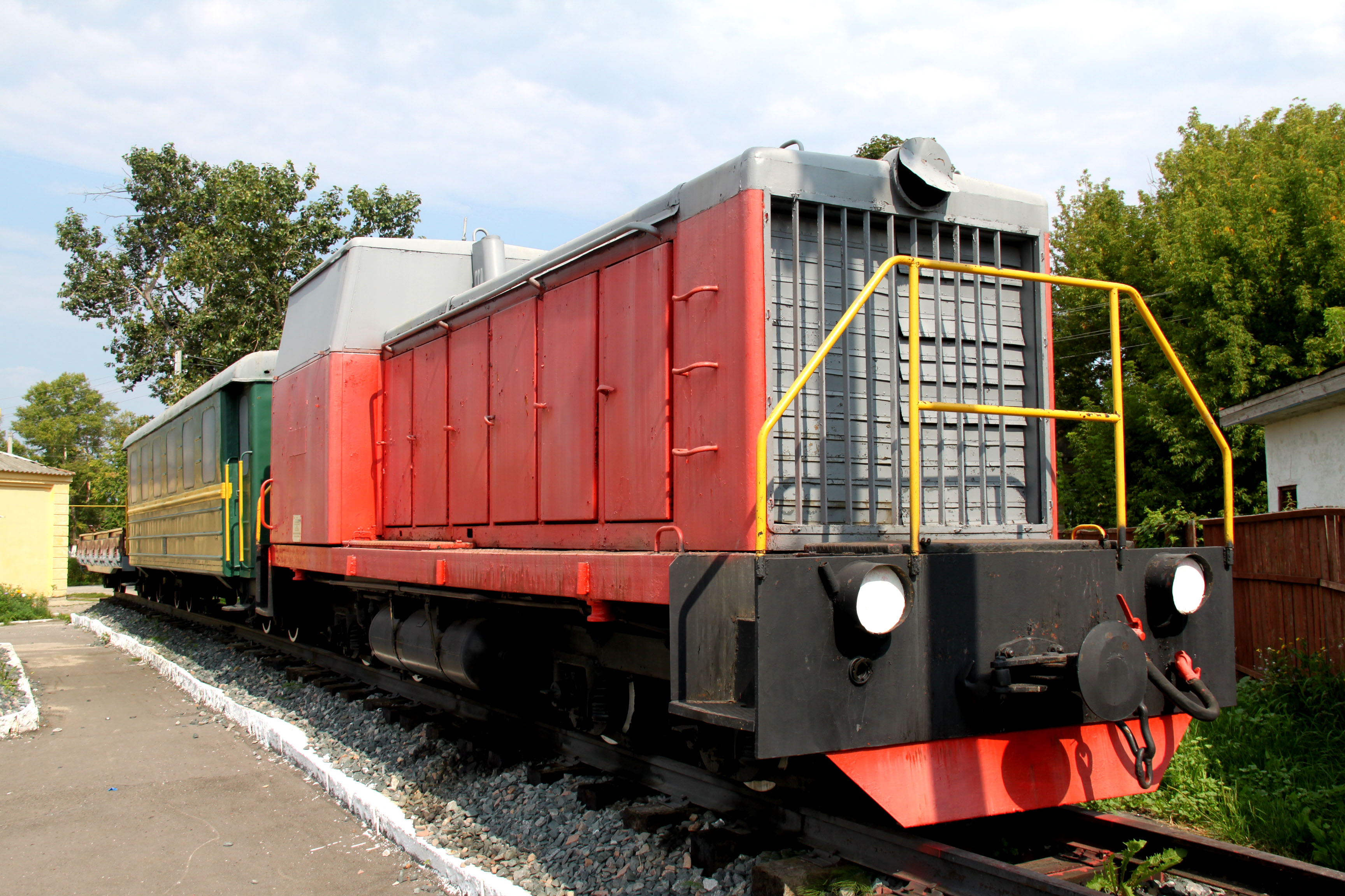 Тепловоз ТУ7А в музее узкоколейной техники станции Тумская